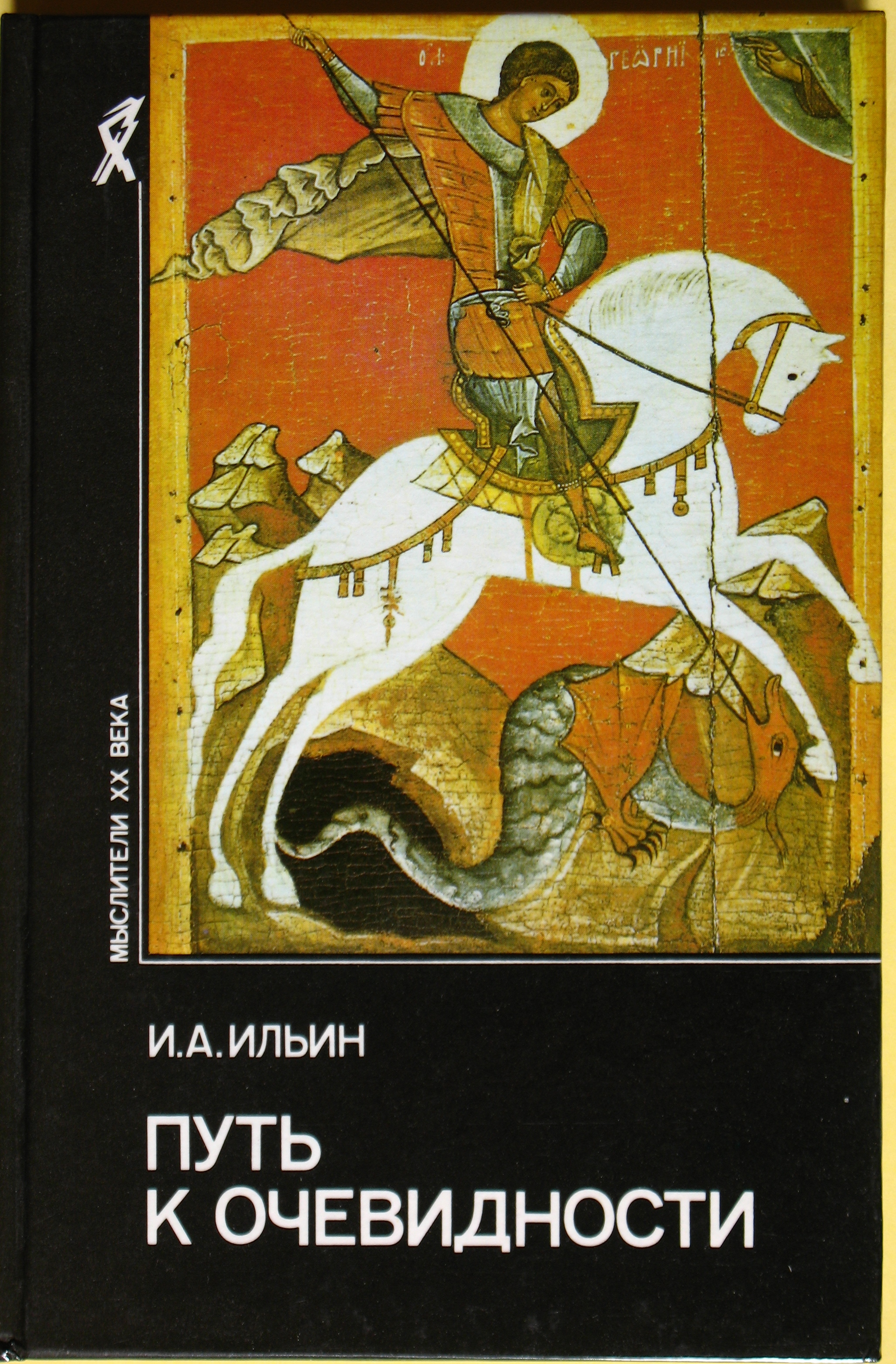 Iljin Ivan book. Серия "Мыслители XX века". Ильин Иван, Путь к очевидности. Москва, изд. "Республика", 1993, тираж 35 000, 432 стр. Обложка - старинная русская икона Георгия Победоносца "Чудо Георгия о змие".